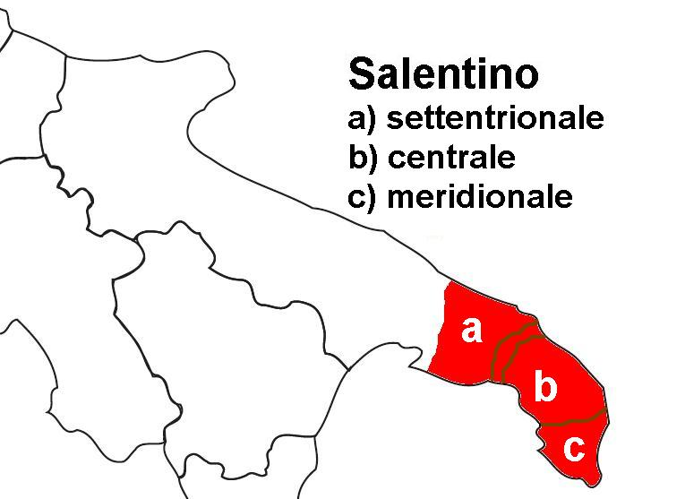 Dove è parlato il salentino